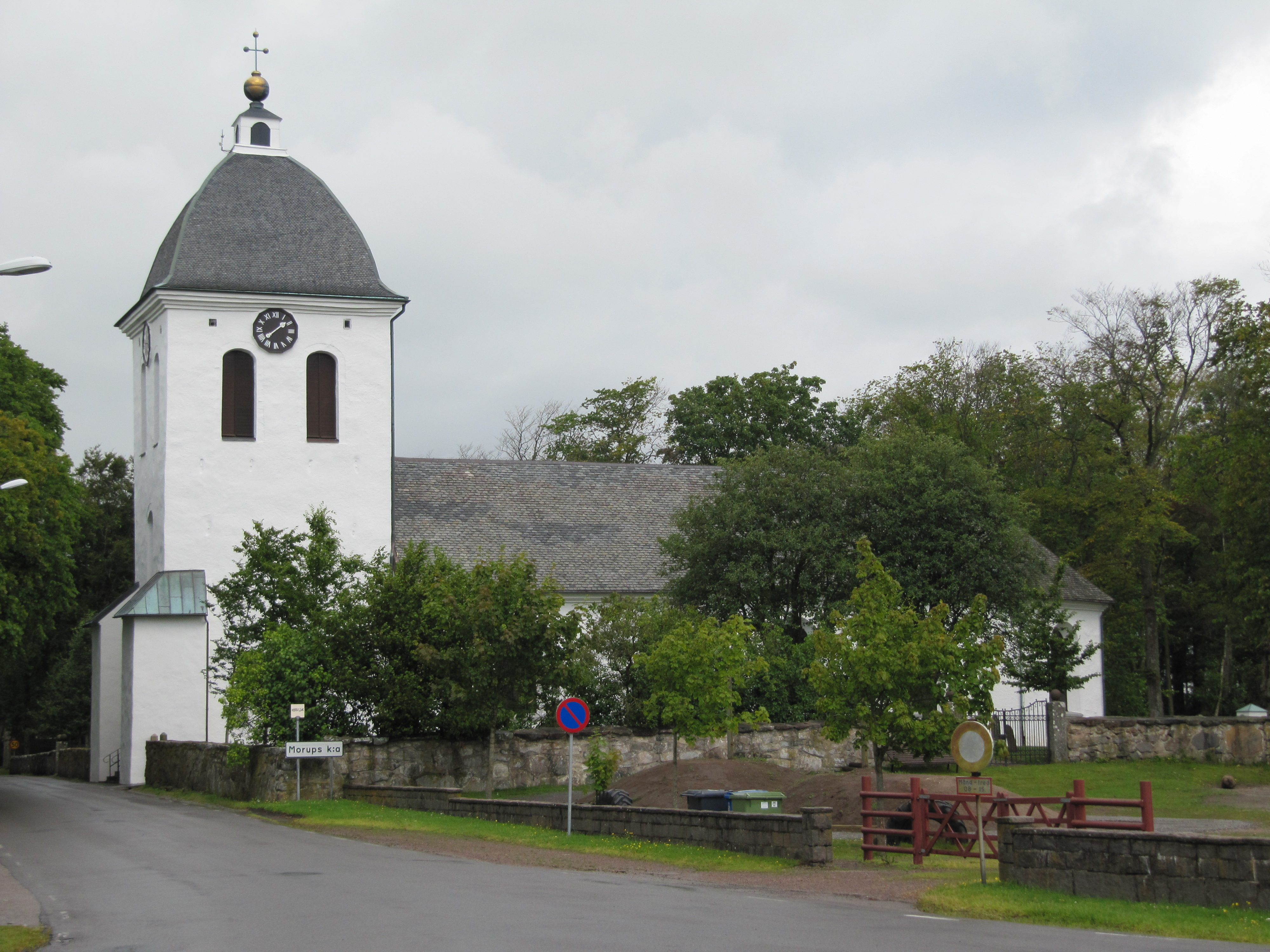 Morups kyrka från söder.